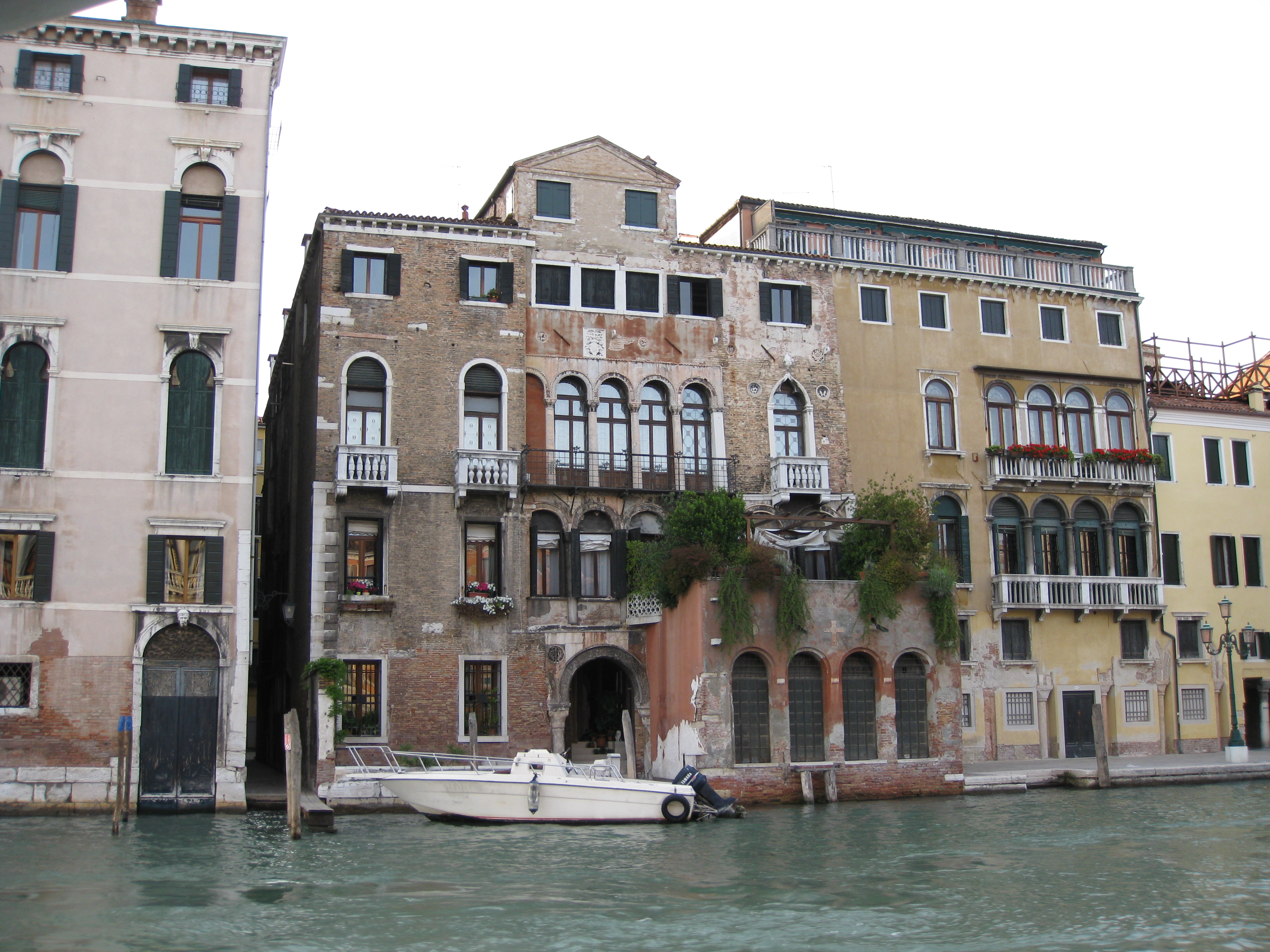 Palazzo Barzizza